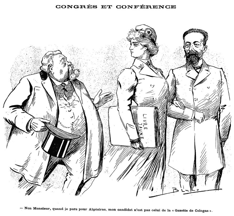 "Congrès et conférence". Caricature à propos de la conférence d'Algésiras et du congrès de 1906.